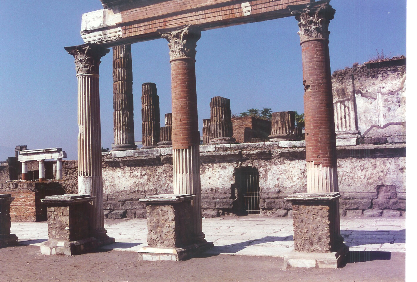 Pompeji